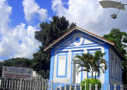 Museu Poá-SP